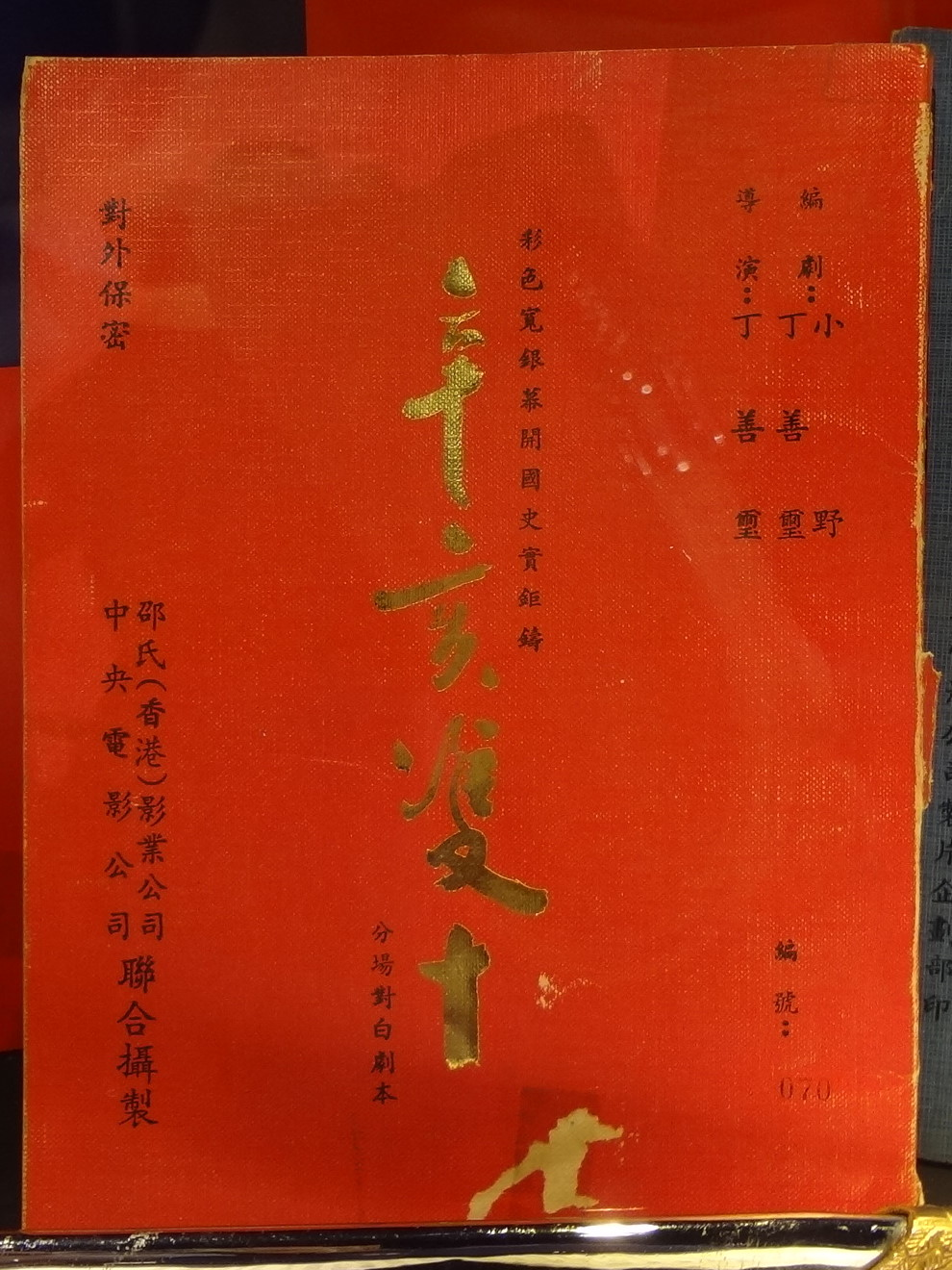 金馬50風華展展示品：中央電影公司與邵氏兄弟公司合拍電影《辛亥雙十》分場對白劇本。